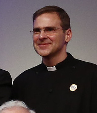 Eröffnung des Zentrums für Interreligiösen und Interkulturellen Dialog durch Vizekanzler und Außenminister Michael Spindelegger und Prinz Saud Al Faisal, Wien, 26.11.2012, Foto: Dragan Tatic